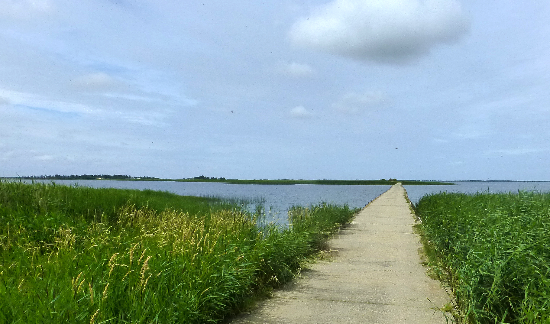 Hindø set fra broen